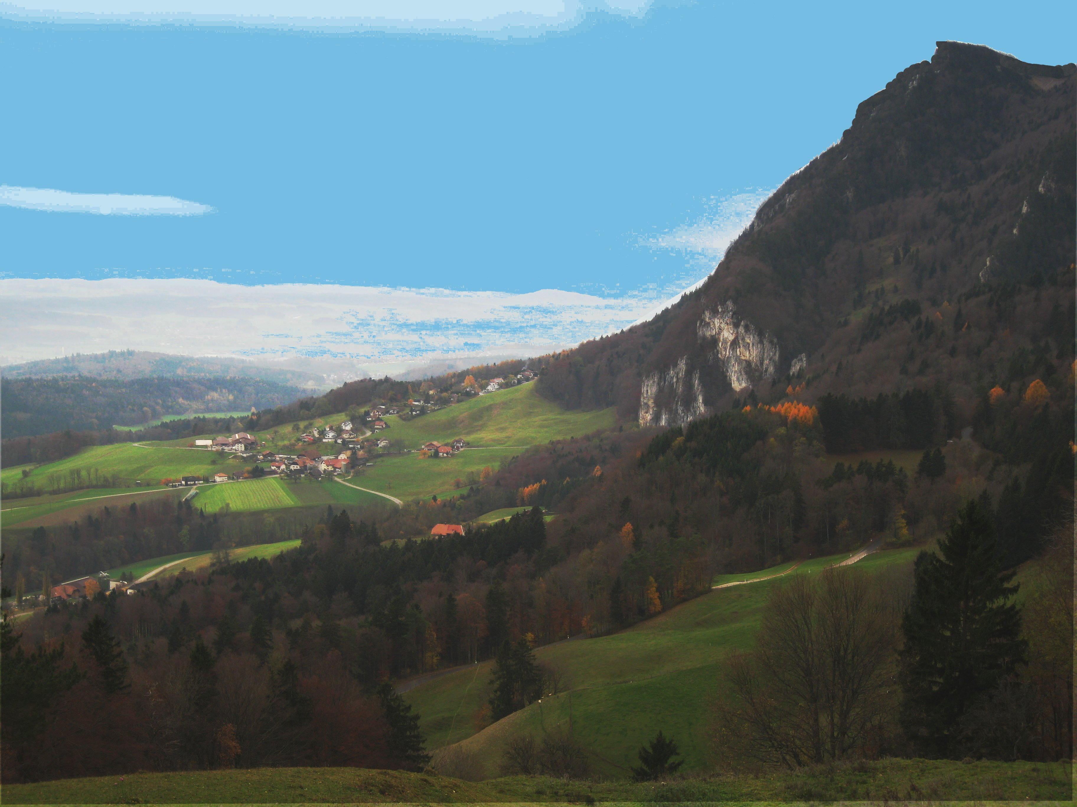 Balmweid vom Hofbergli/Chreuzaussichtspunkt aus